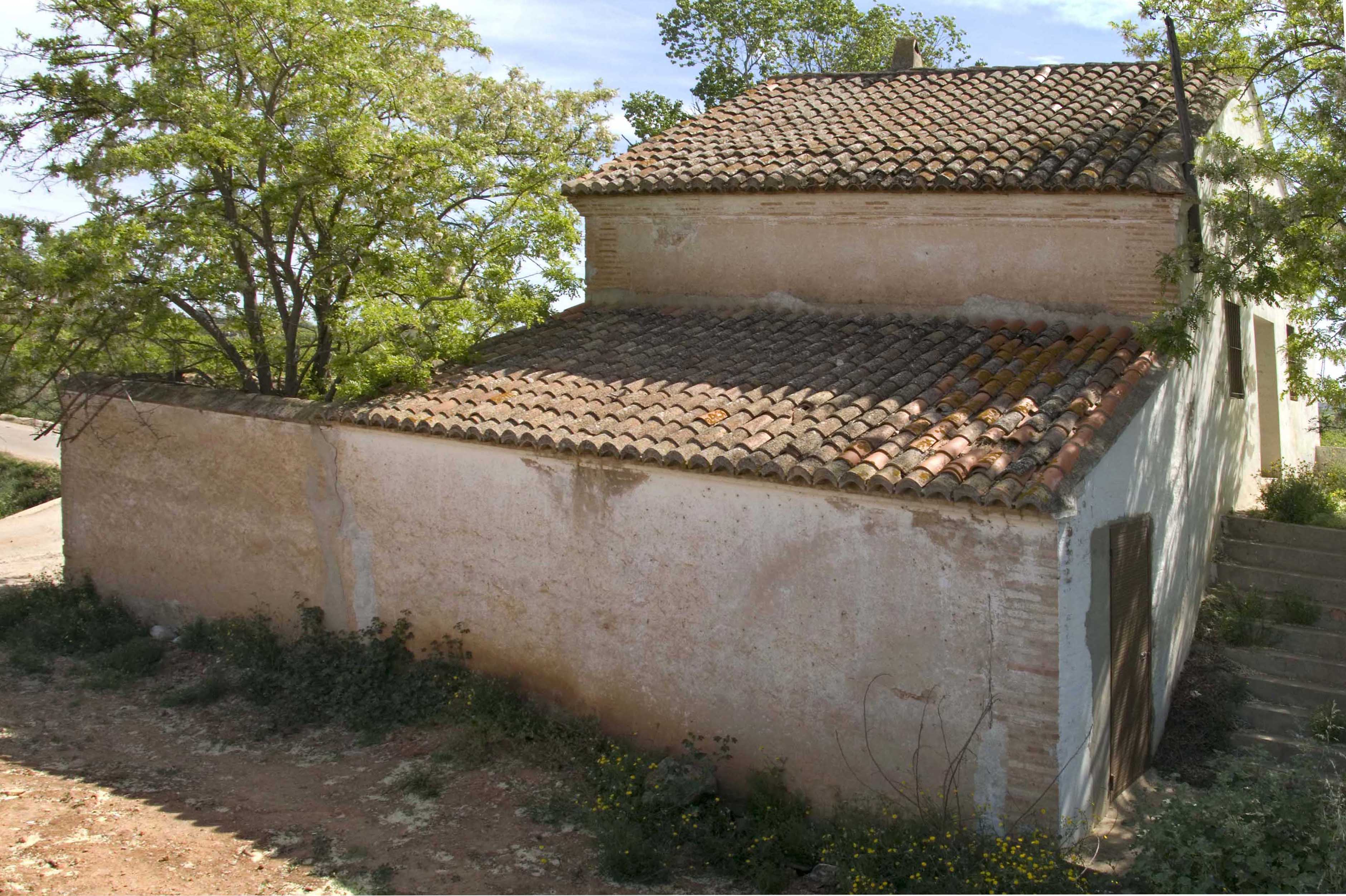 (Séquia reial del Xúquer) Instal·lació hidràulica que serveix per travessar el barranc dels Algadins, amb dues rampes d'entrada i sortida; i un tram recte La longitud és de 170 metres i la capacitat per a 10 m3. per segon. Amplada i alçada de 3 i 1'80 metres, respectivament.